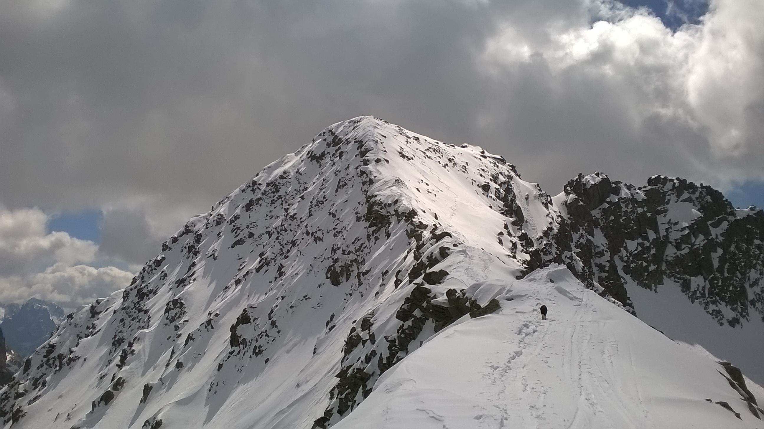 Skialp cima Cece